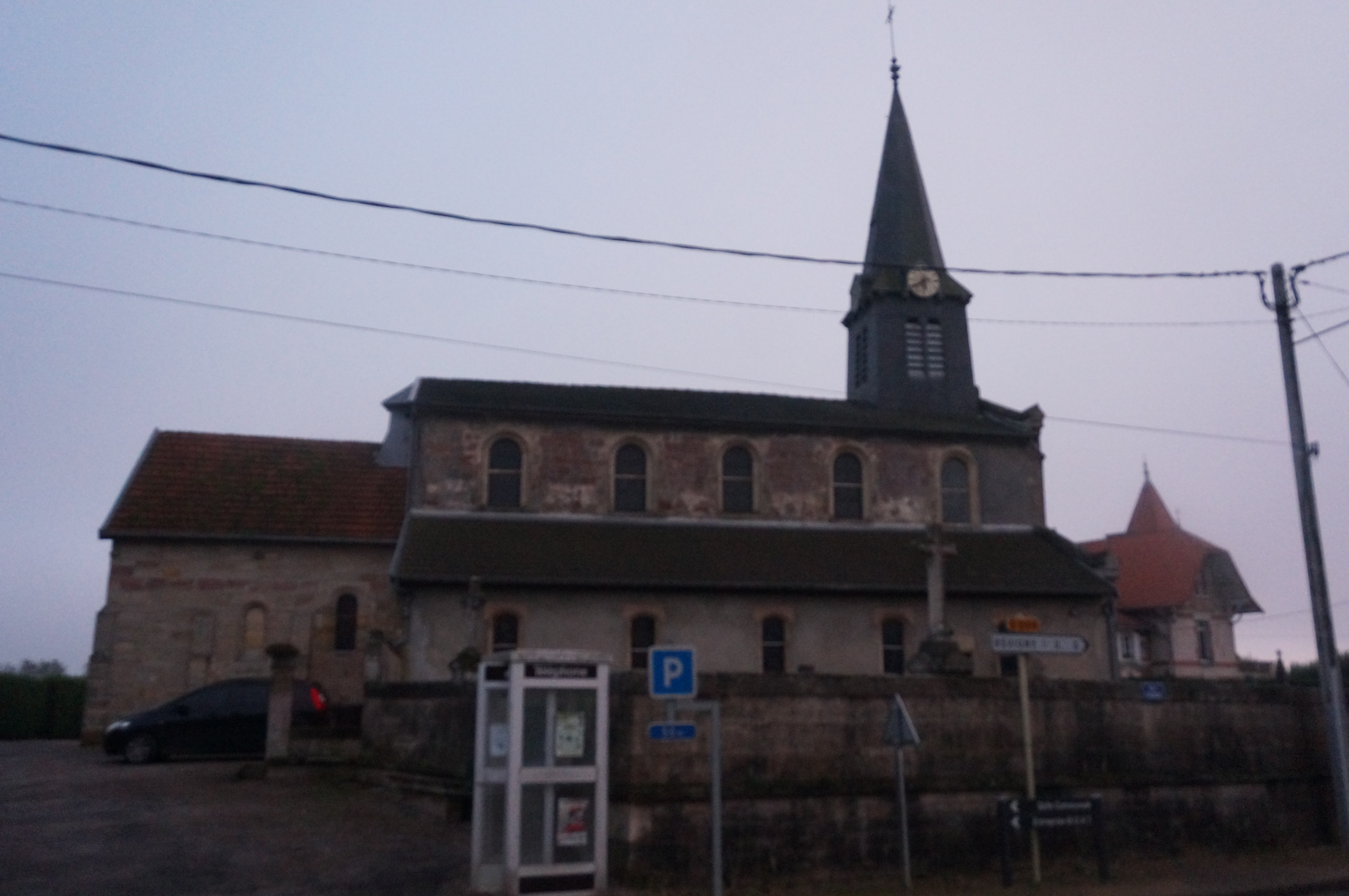 à Brabant-le-Roi.